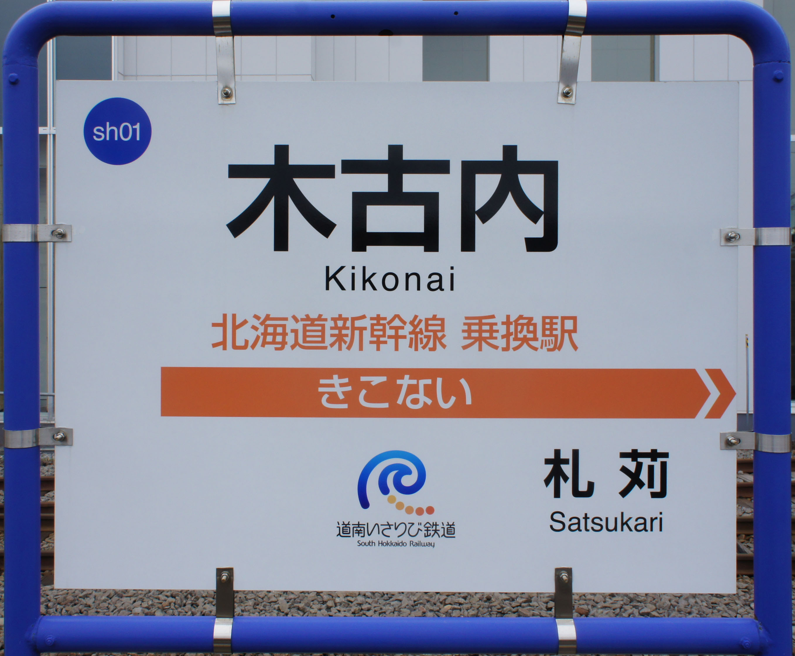 道南いさりび鉄道線・木古内駅の駅名標